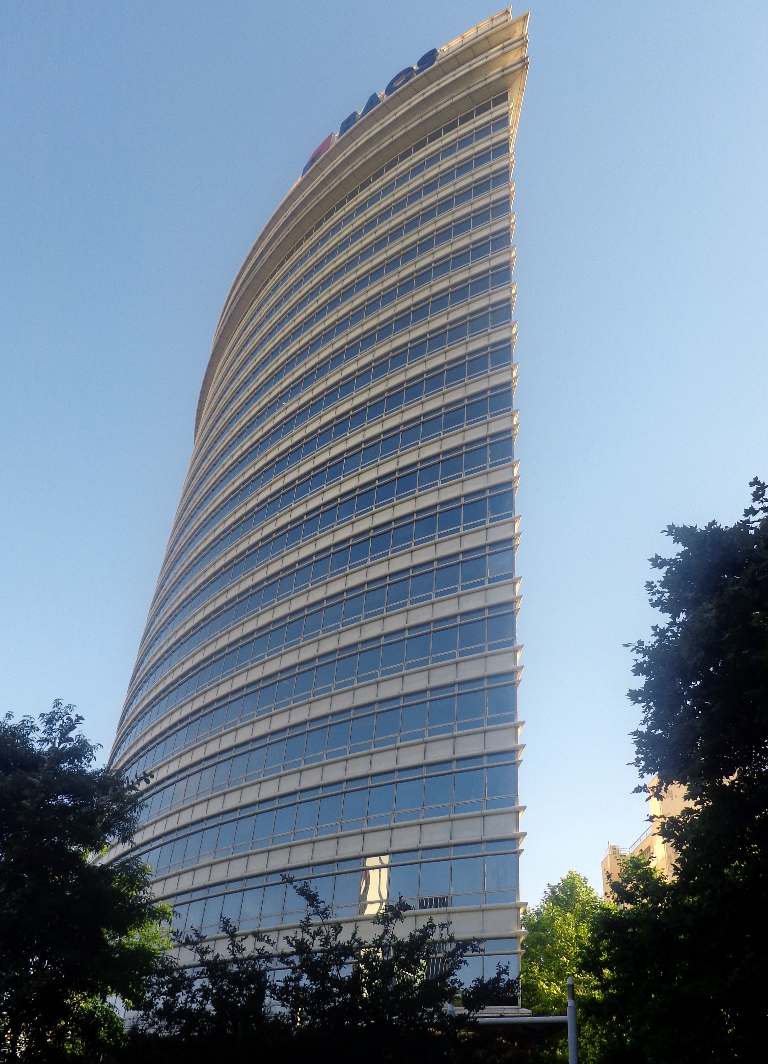 Edificio República, En Tucumán 1, barrio de Puerto Madero, Buenos Aires, Argentina.